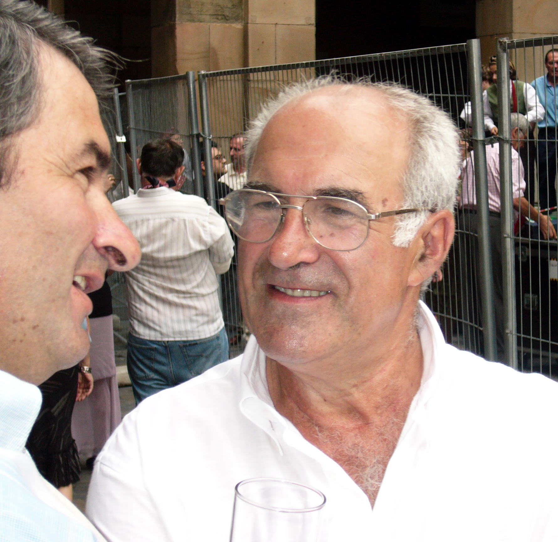 Alberto Fernández Velasco, Berto Velasco, conversando